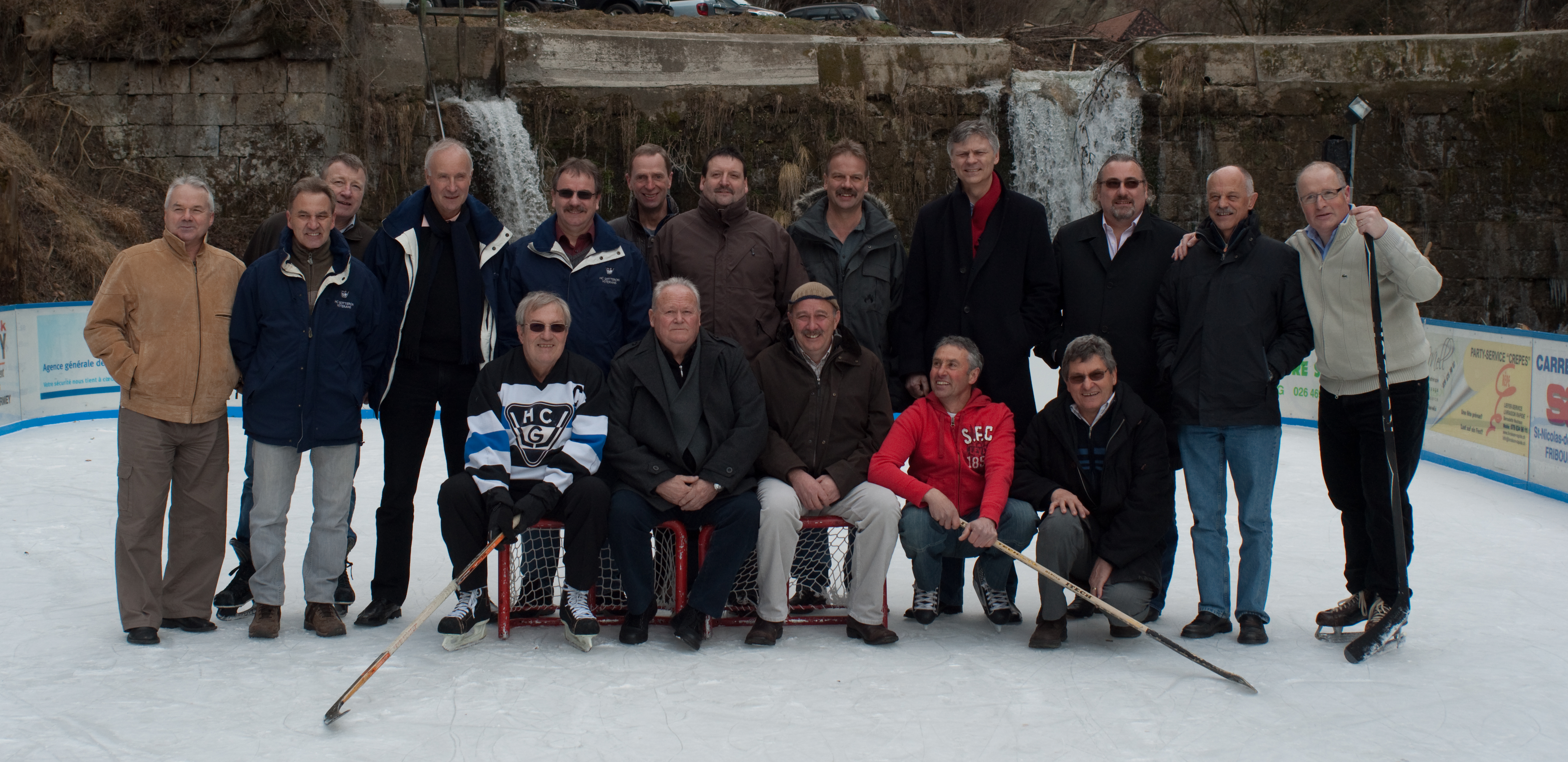 L'équipe de Fribourg-Gottéron de 1980 lors du 30e anniversaire de l'accession en Ligue nationale A.